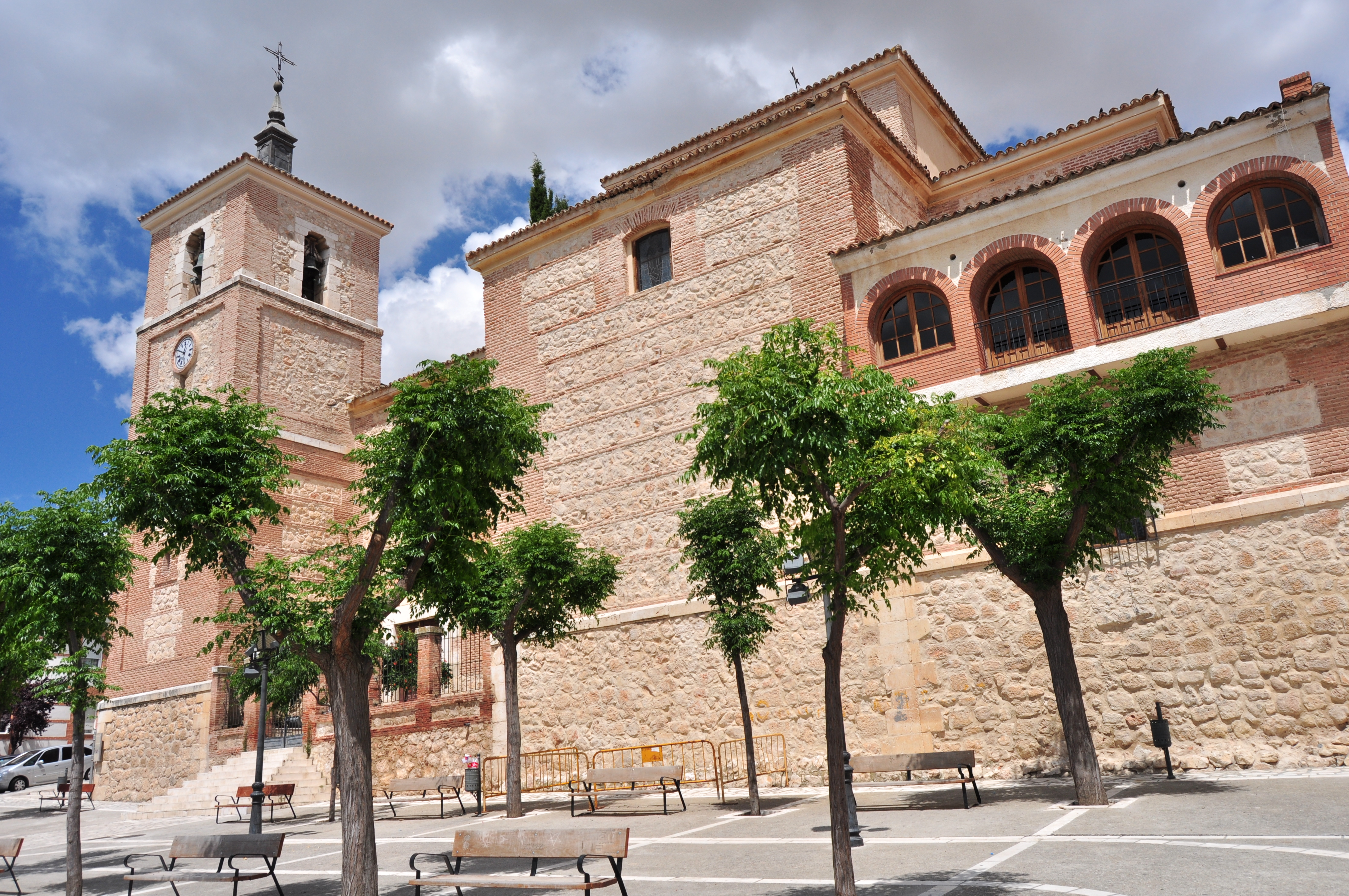 Tielmes - 002